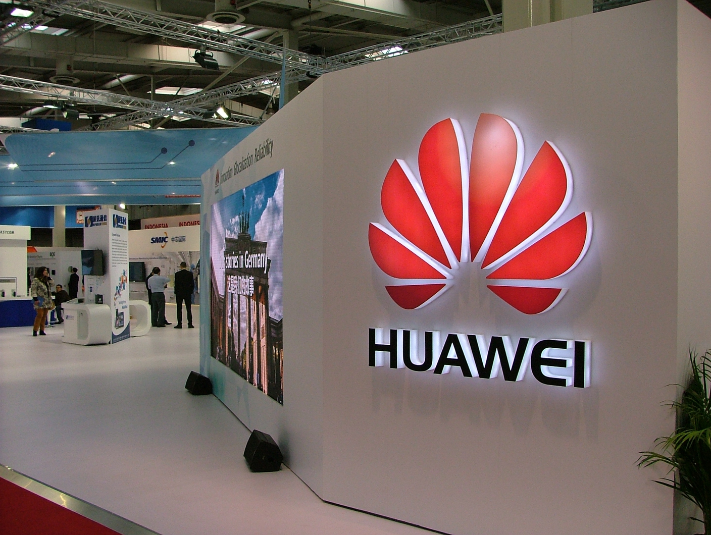 CeBIT 2015 in Hannover